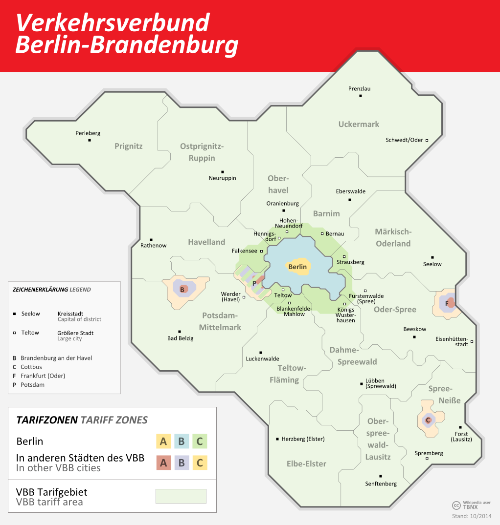 Übersicht über das Tarifgebiet des Verkehrsverbundes Berlin-Brandenburg (VBB) Map of the VBB (Verkehrsverbund Berlin-Brandenburg) tariff zones